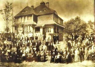 Königsberger Gothen vor dem neu errichteten Gothenhaus in Königsberg